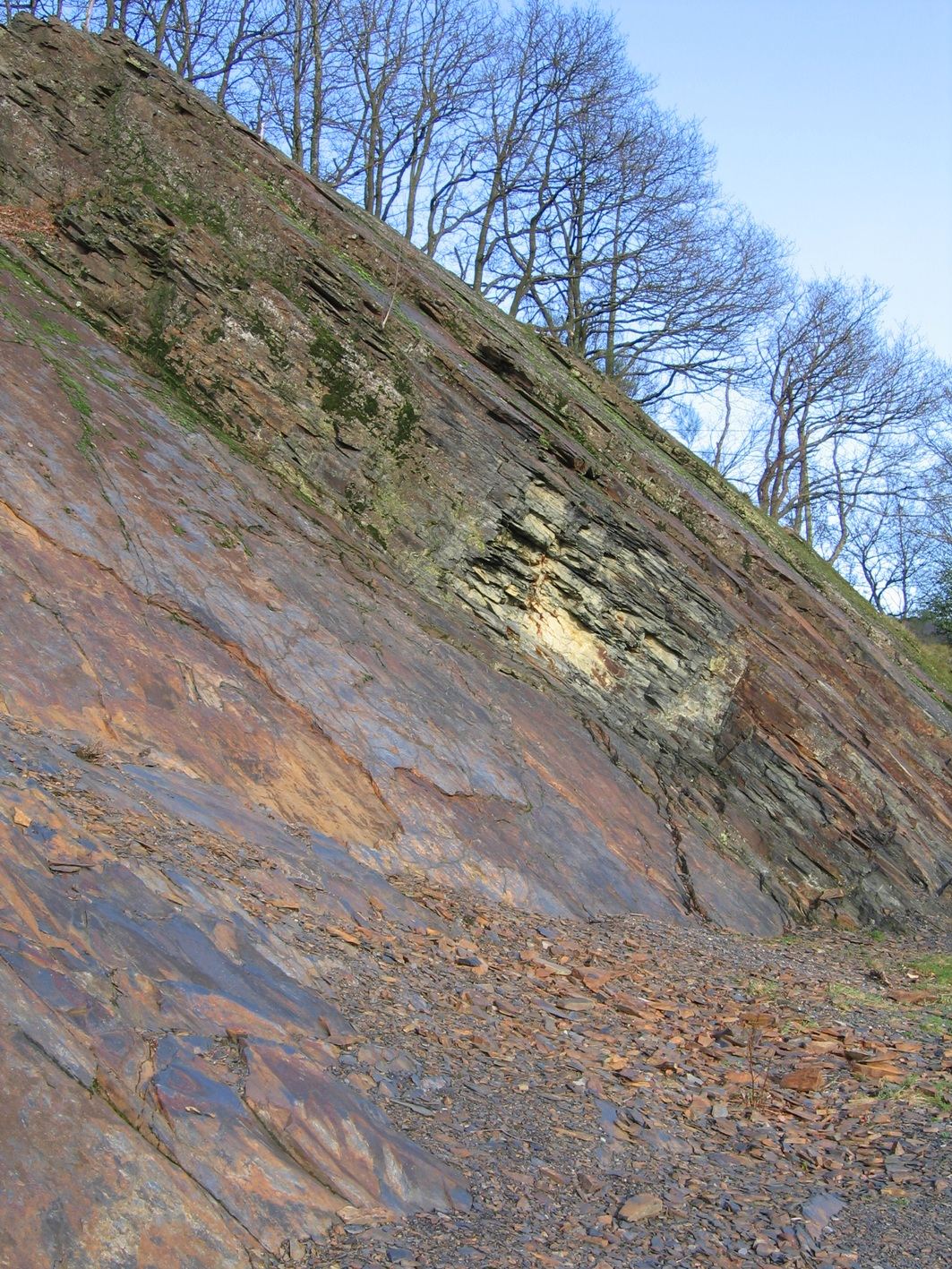 Schistes au lieu-dit de la Roche à 7 heures, Monthermé (08)